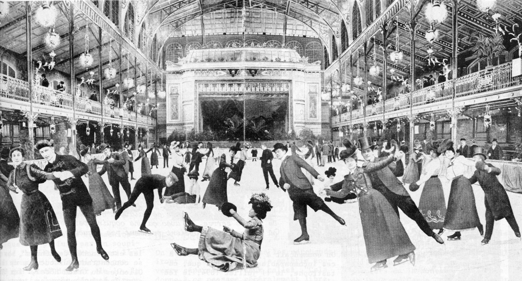 IJsschaatsers in het Palais d'été (Centrale Hallen), Brussel. Foto uit de periode 1893-1914